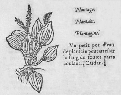 Illustration du plantain et des ses propriétés médicinale dans Tresor des remedes secrets par Evonyme Philatre (Gesner)